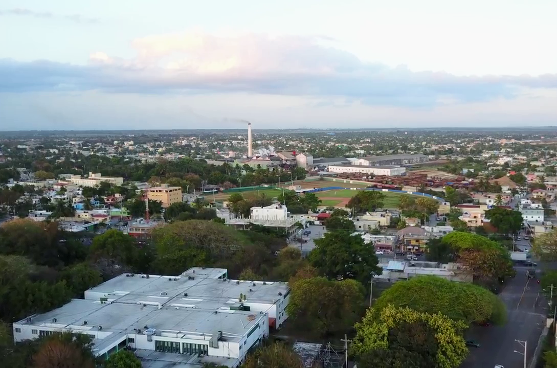 Zona Universitaria de SPM